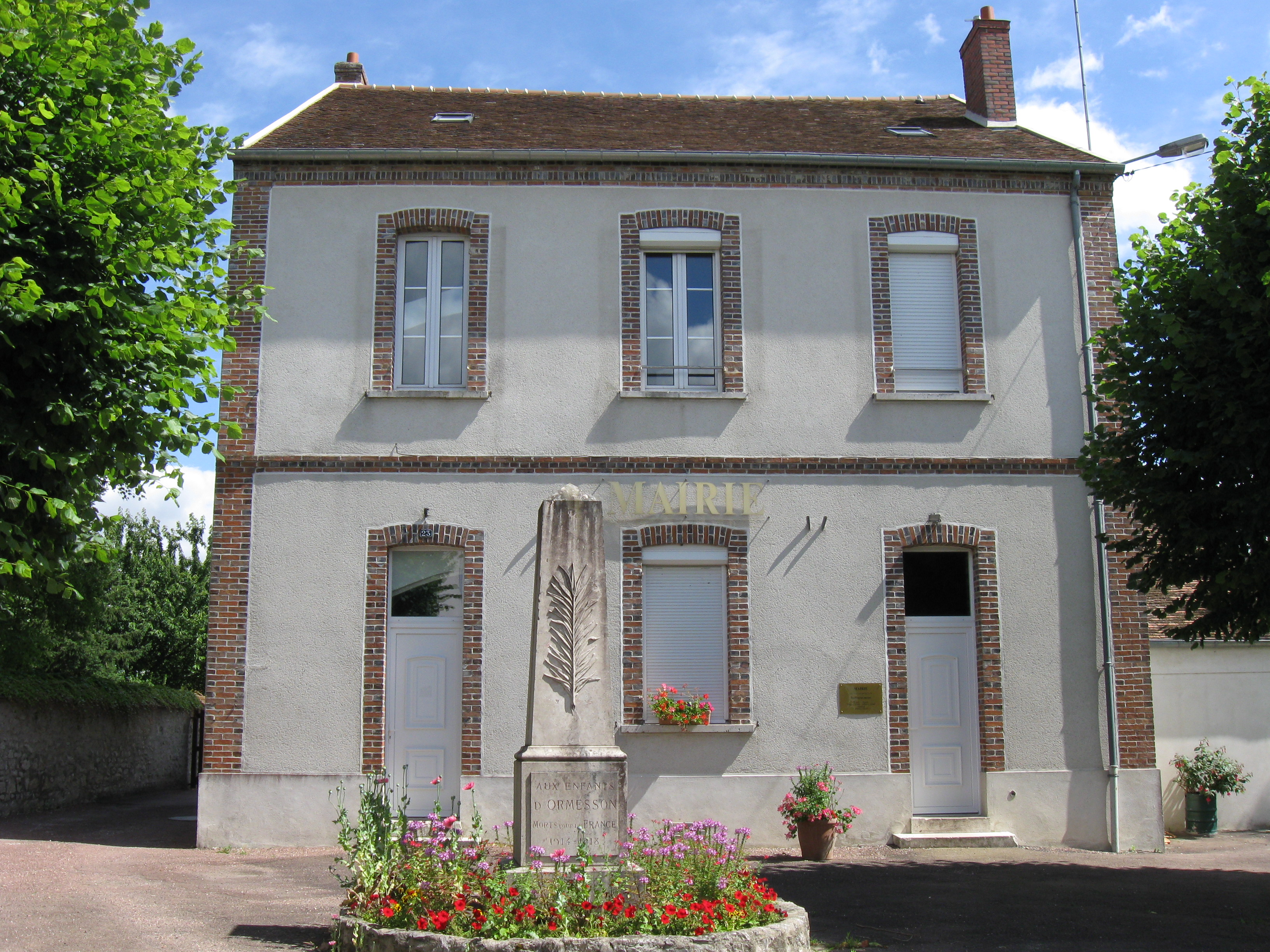 Mairie d'Ormesson. (département de la Seine et Marne, région Île-de-France).